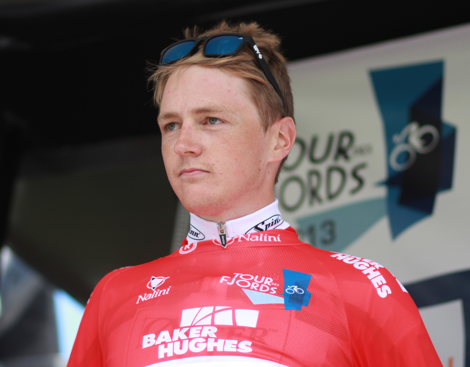 Filip Eidsheim mottar trøyen som den mest offensive rytter i 2. etappe i Tour des Fjords 2013